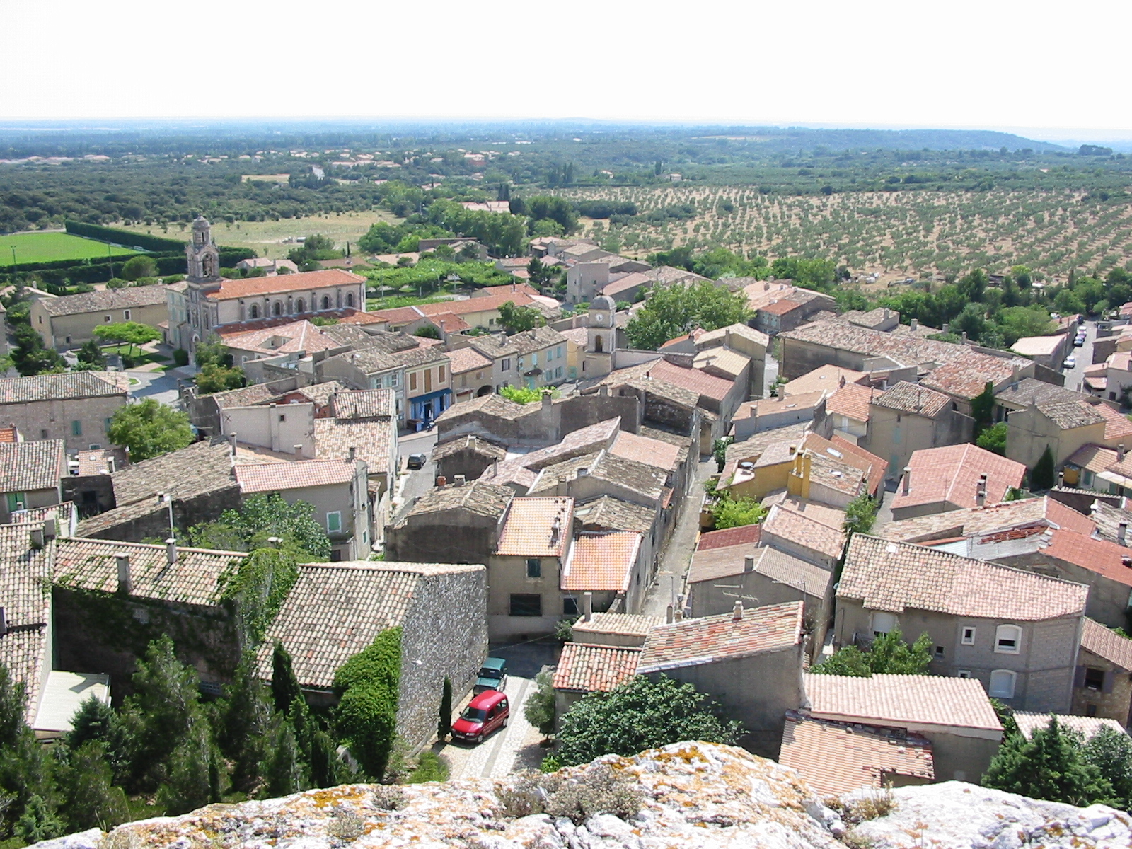 Le village d'Aureille (Bouches-du-Rhône) vu depuis le château